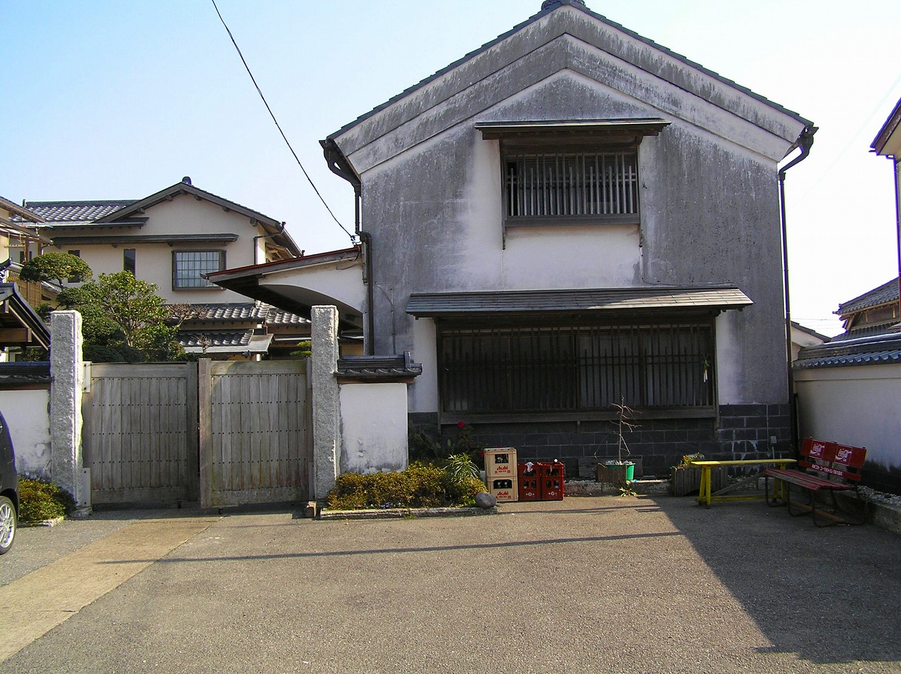 大原漁港近くの土蔵のある家